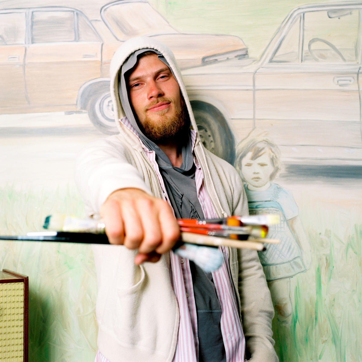 Martin Saar